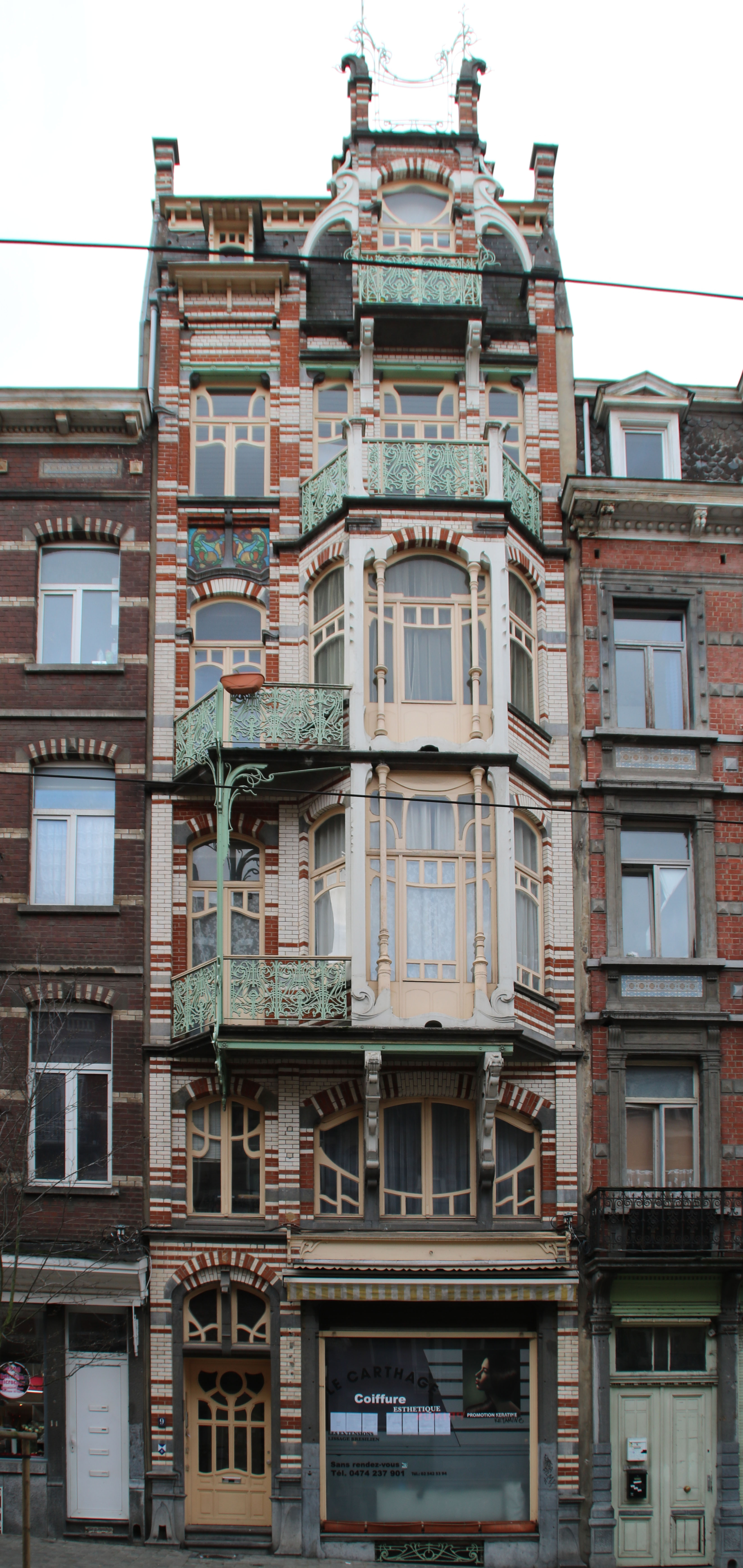 Maison